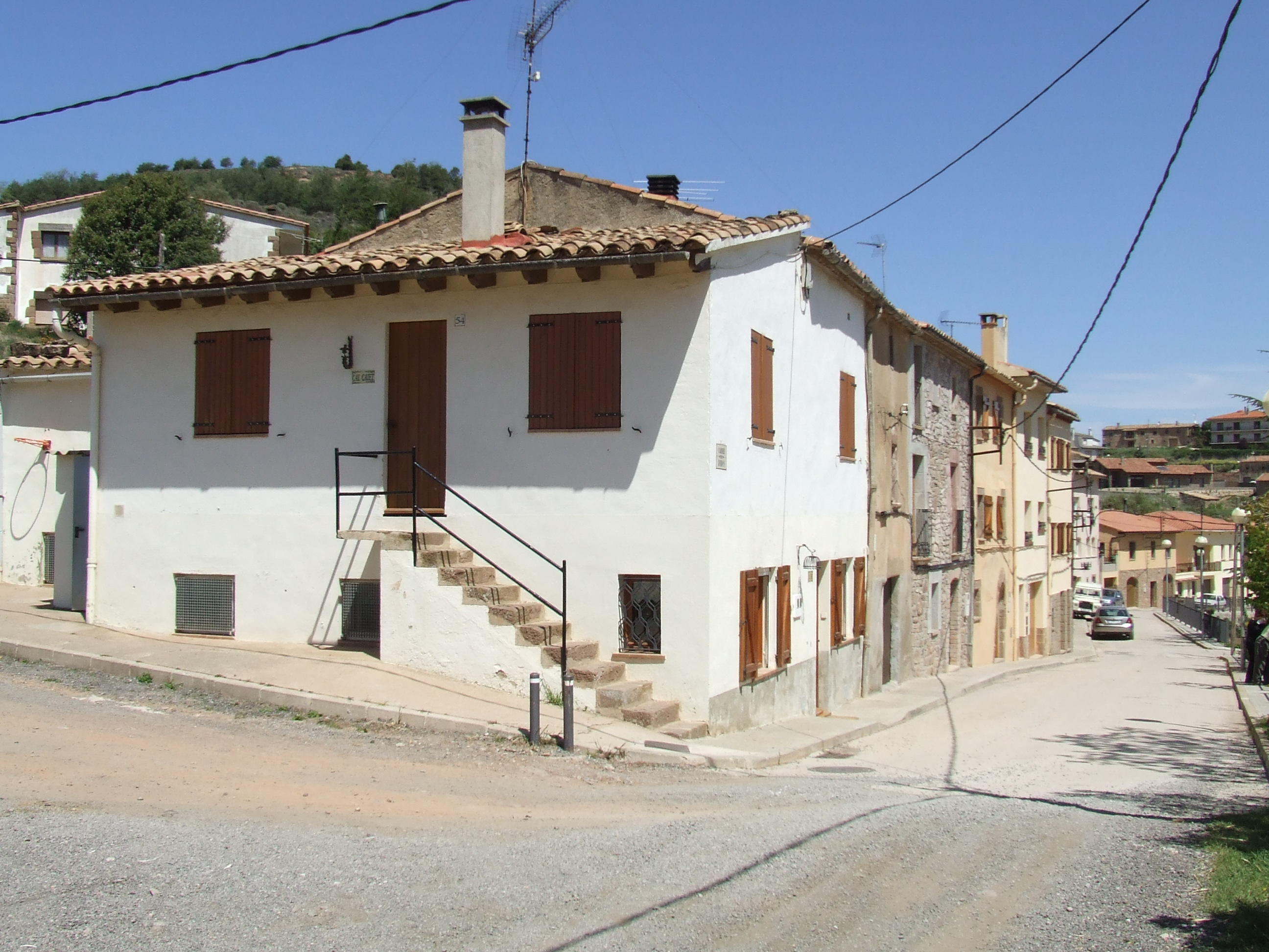 La Sagrera (l'Estany, Moianès)